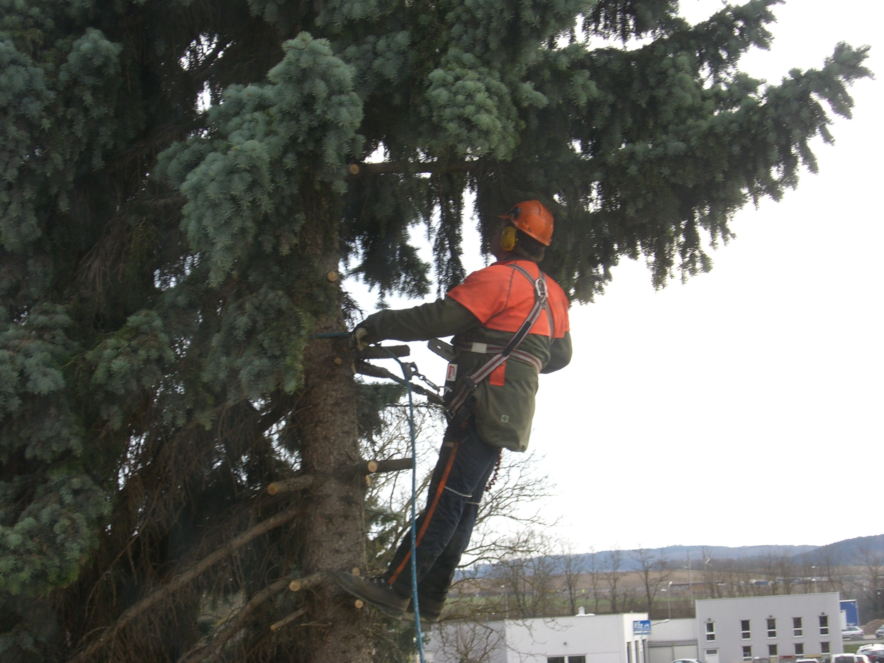 Baumpfleger mit unzureichender Sichaerheitsausrüstung bei der Arbeit